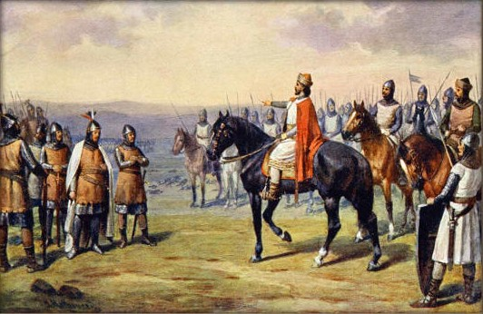 Josef Mathauser - Setkání knížete Václava s knížetem Radslavem